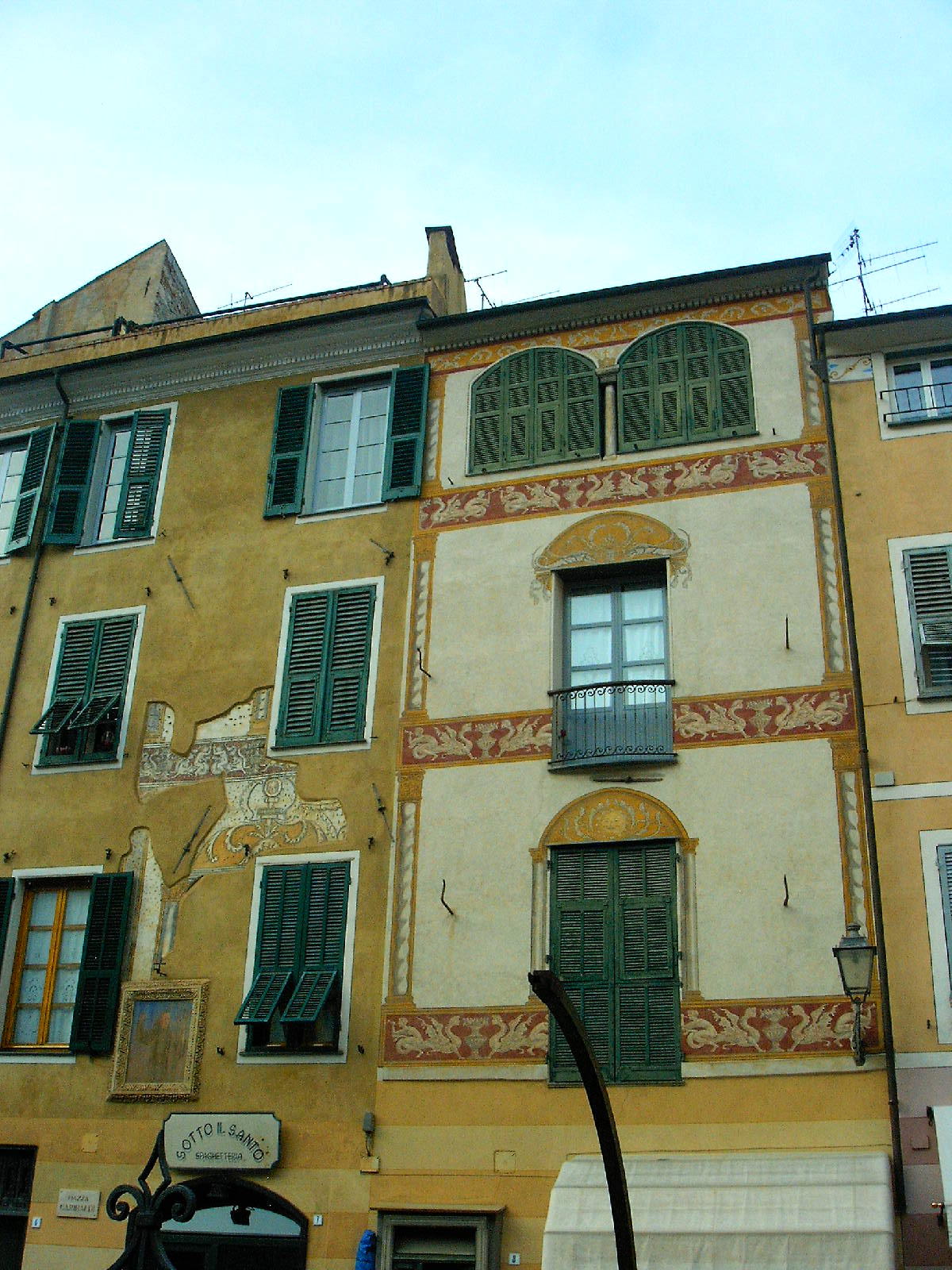 palazzi in piazza Garibaldi a Finalborgo Buildings in piazza Garibaldi, at Finalborgo